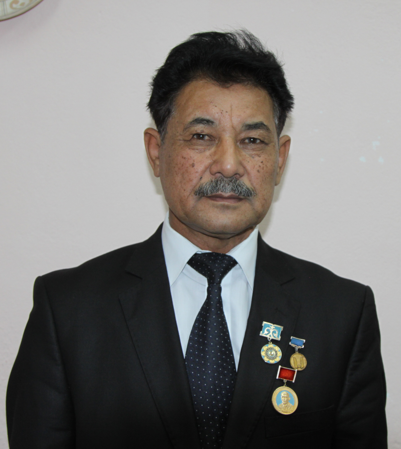 Елеуов Сауранбек Еркінбекұлы